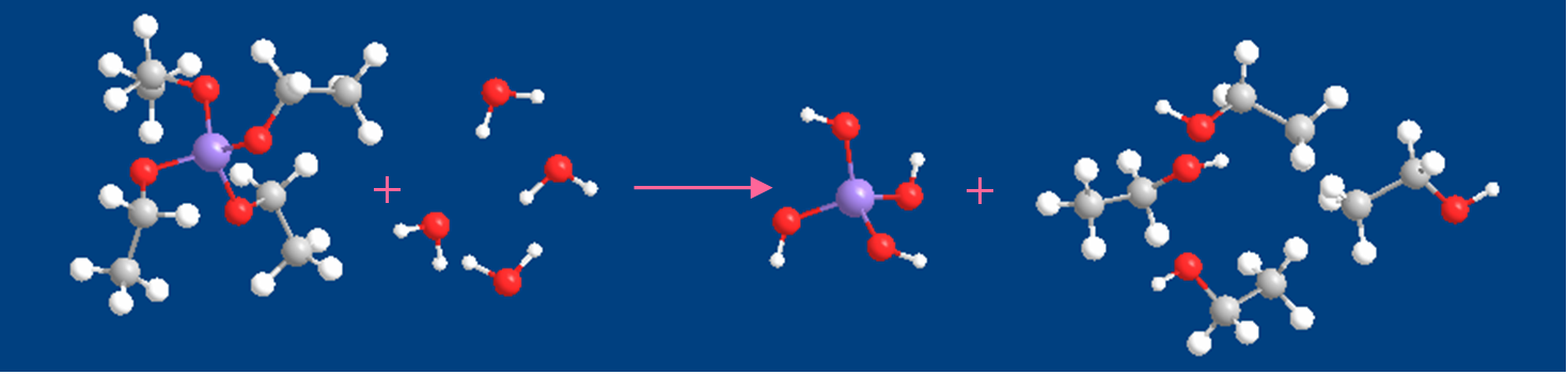 Schéma réactionnel de l’hydrolyse du tétraéthoxysilane. Auteur : Frédéric Chaput, réalisé avec un programme de dessin. Licence GFDL Frédéric Chaput